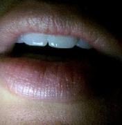 Es una foto que yo misma le tomé a los labios de mi cuñado cantando.